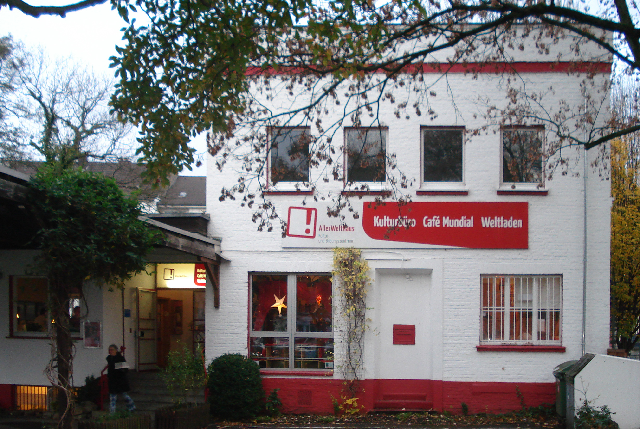 Kulturzentrum AllerWeltHaus, Potthofstraße 22, im Dr.-Ferdinand-David-Park in der Hagener Innenstadt